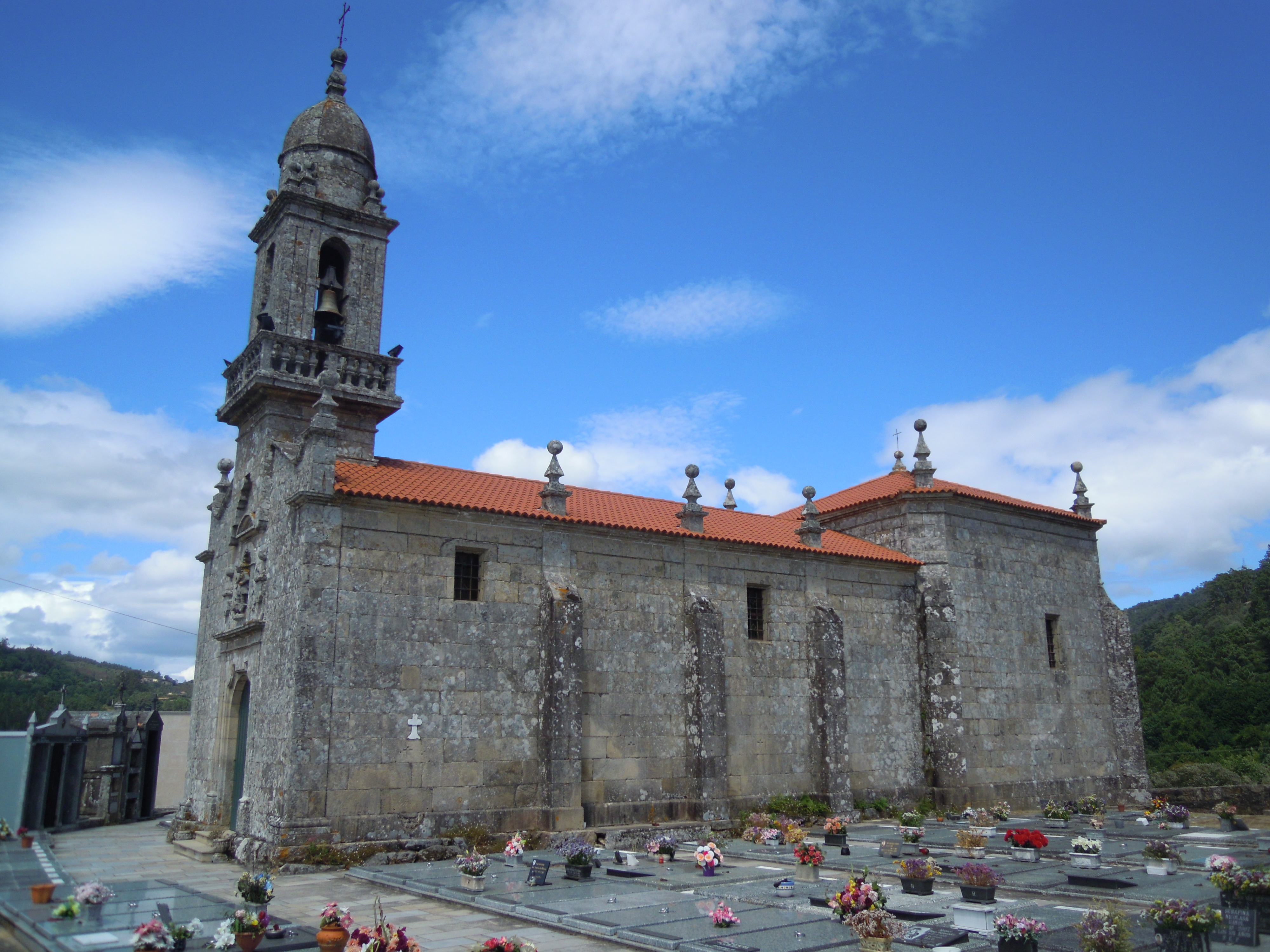 Igrexa parroquial de San Miguel de Desteriz (Padrenda)